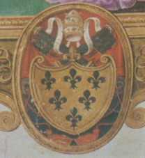 Wappen Pauls III. aus dem Frontispiz der Hs. Cappella Sistina 611: Costituzioni della Cappella Sistina von Ludovico Magnasco di Santa Fiora